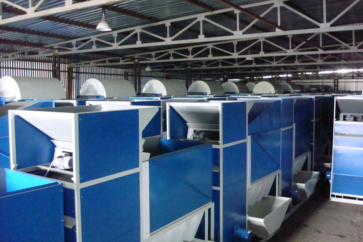 Сепаратори САД на луганському підприємстві Аеромех